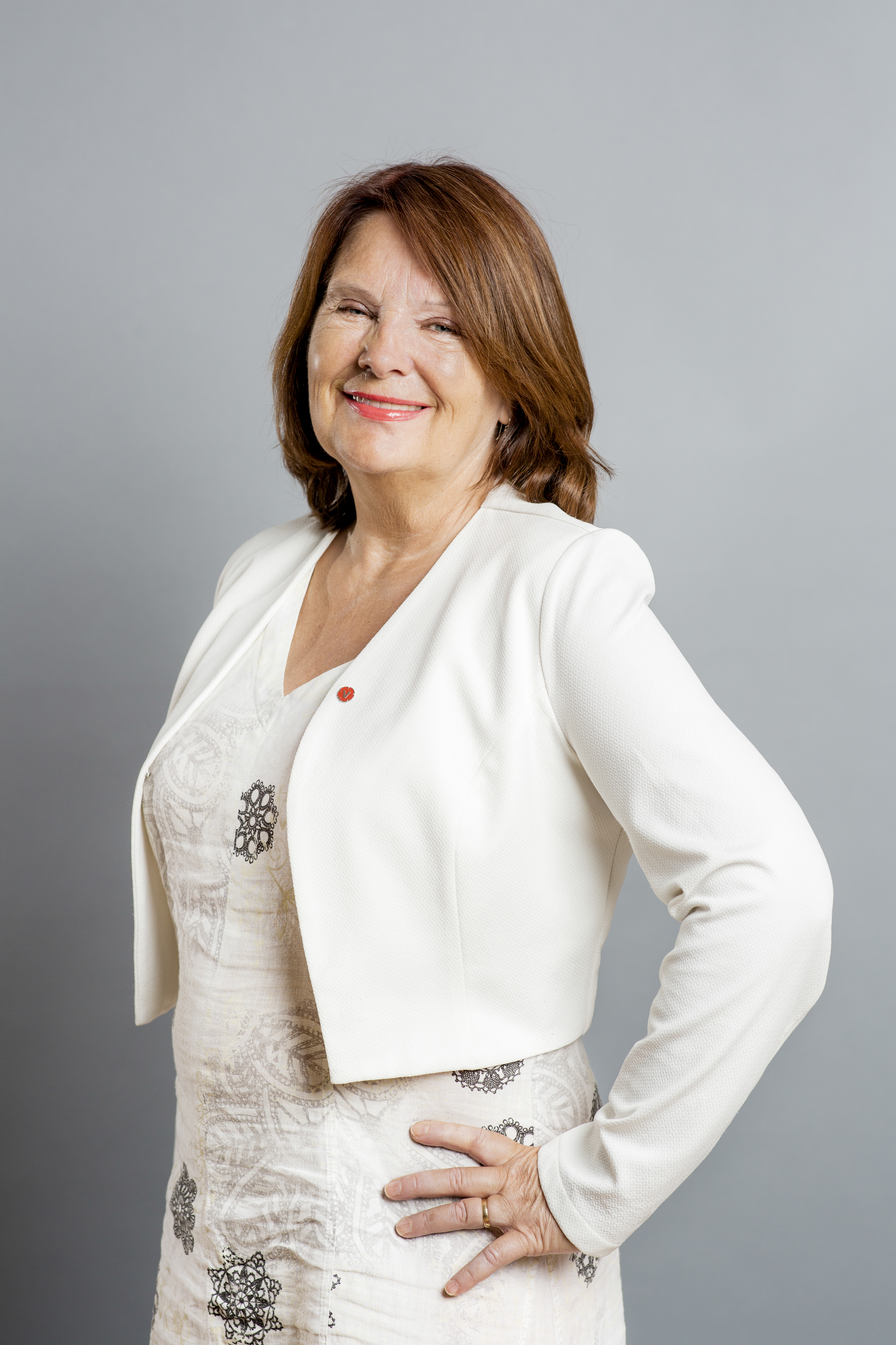 Lotta Johnsson Fornarve. Vänsterpartiet. 2018.